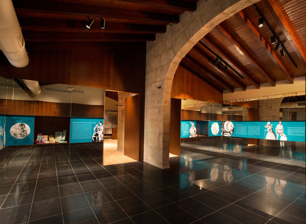 Sala de les rondalles de l'espai museogràfic